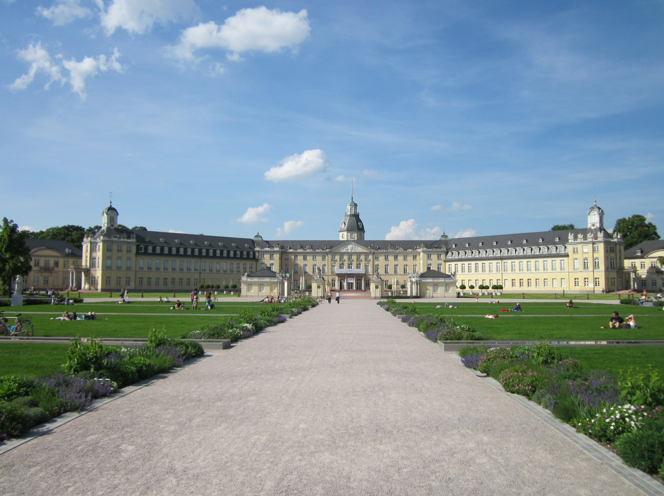 Schloss Karlsruhe